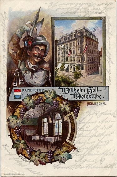 Heilbronn Doppelhaus Kaiserstraße 33 (Besitzer Herrmann Bauknecht) und 35 (Besitzer Robert Graeßle, Weinwirtschaft des Wilhelm Holl), erbaut nach Plänen des Architekten August Dederer